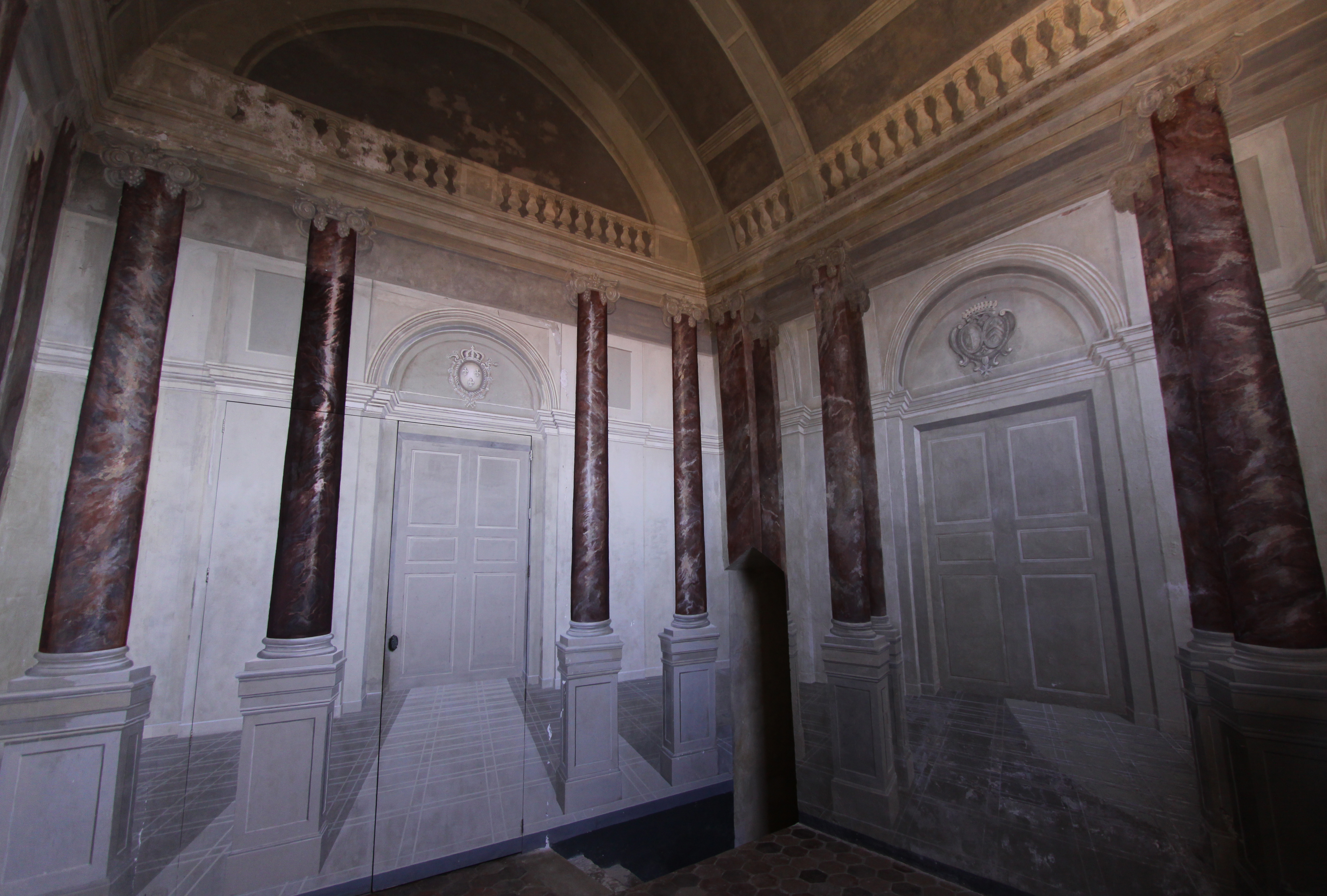 Burg Sagonne im französischen Département Cher - Kapelle mit Wandmalereien